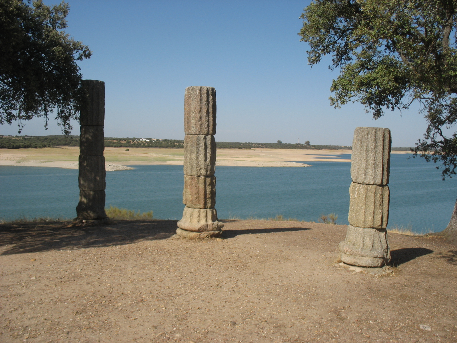 Restos del templo romano "la Cilla". Trasladados de Talavera la Vieja (Augustobriga), Bohonal de Ibor, Cáceres, España.